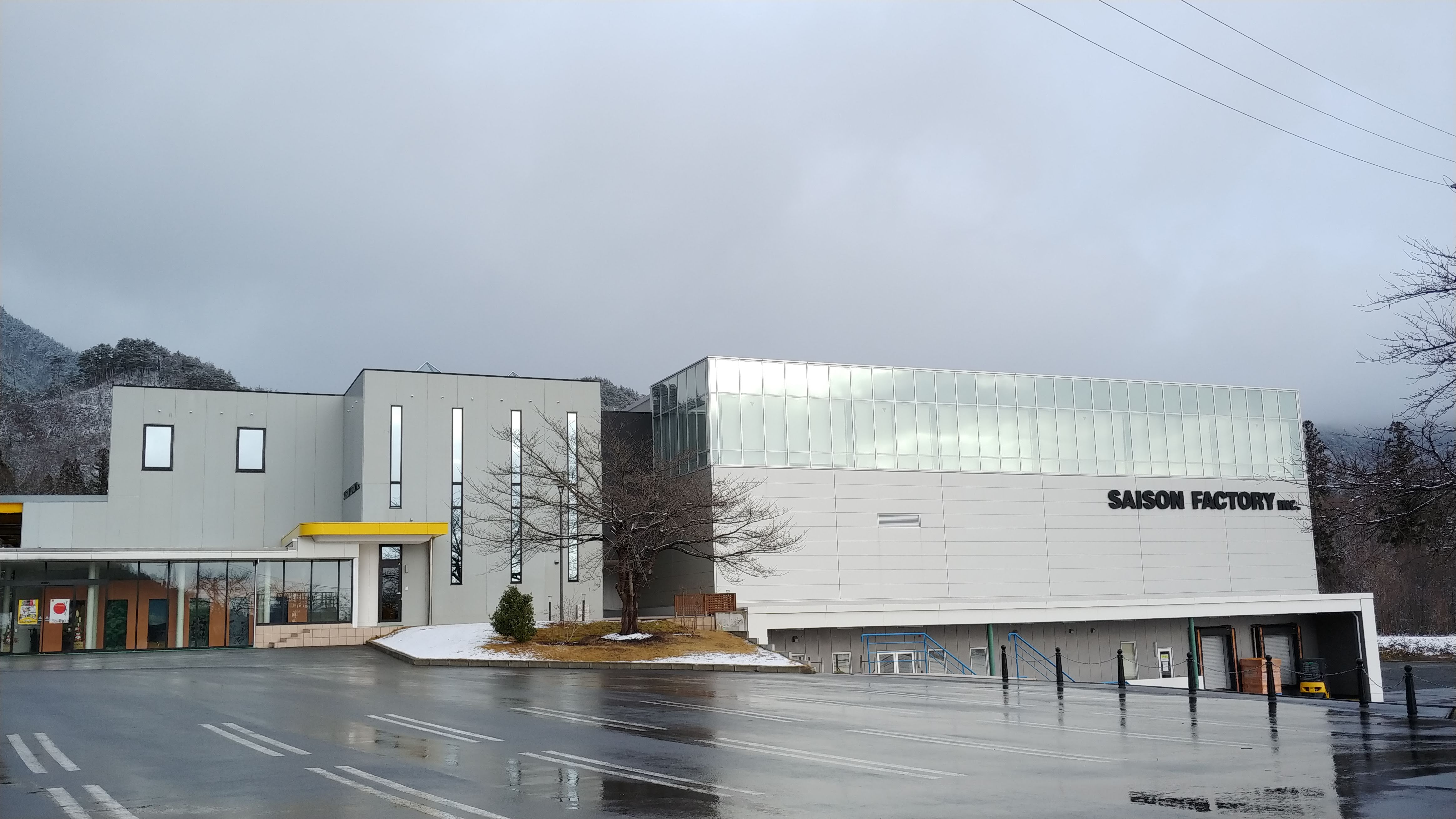 セゾンファクトリー 本社建物